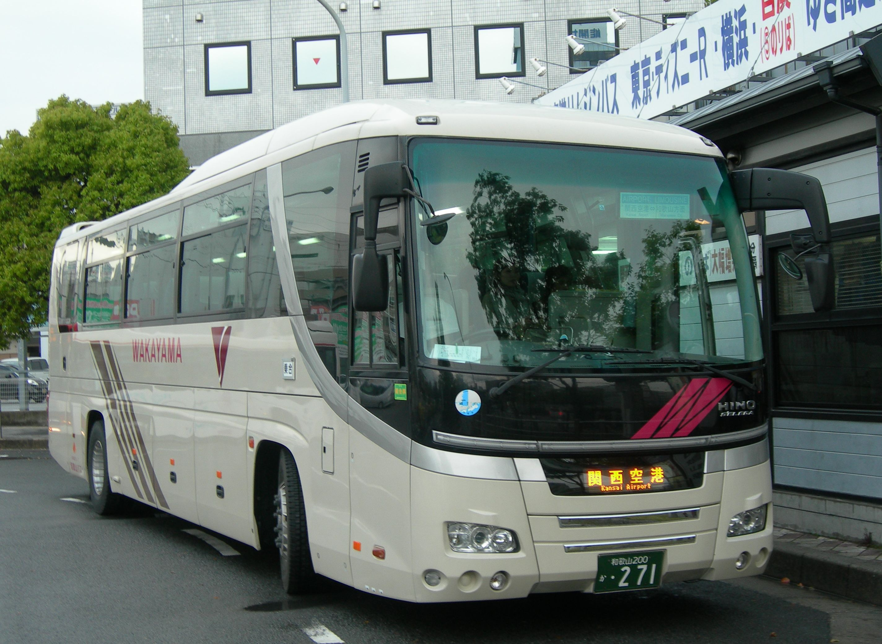 和歌山バス 関西空港リムジンバス